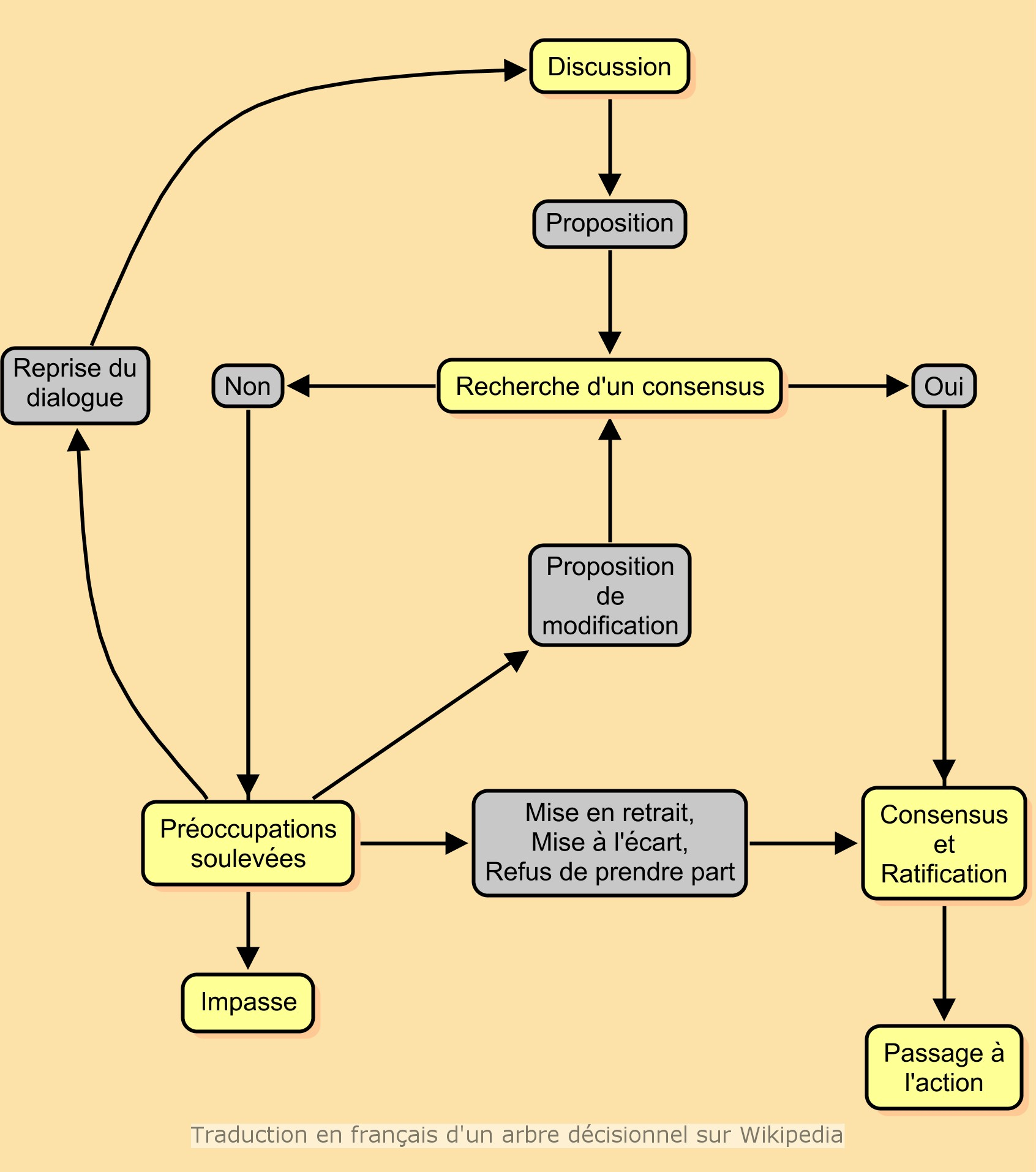 Traduction de l'arbre décisionnel anglais